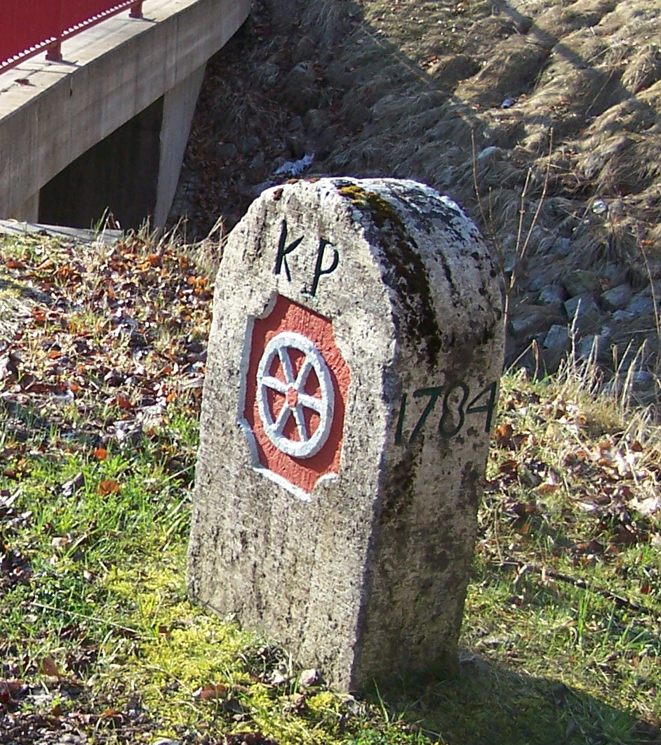 Ein Grenzstein des Obereichsfeldes (Kurmainz) bei Heyerode - gegenüber der Untermühle.